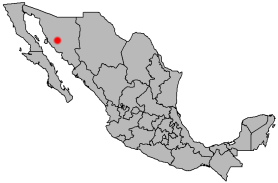 Locator map of Hermosillo, Sonora, Mexico [Hermosillo [